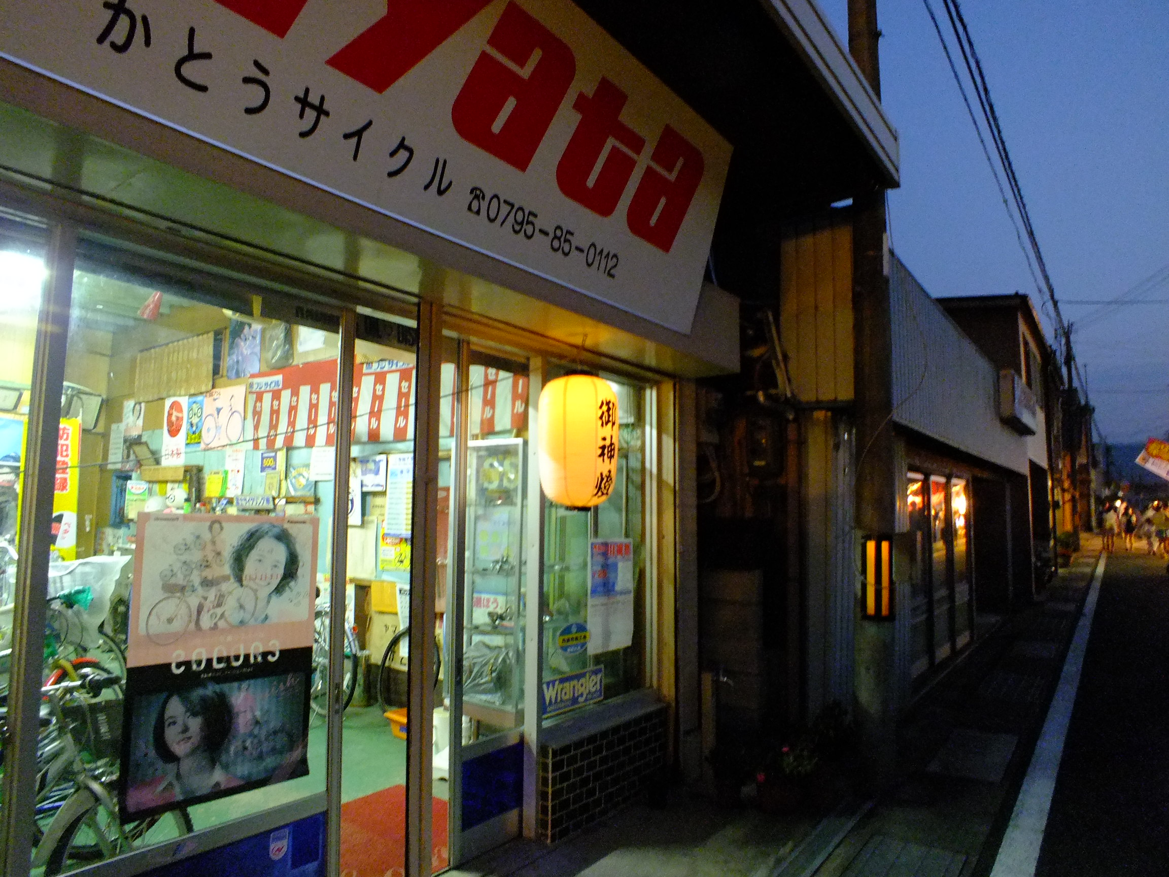 20140729 Ichijima-Kawasuso Matsuri 市島川裾祭（丹波市市島町）